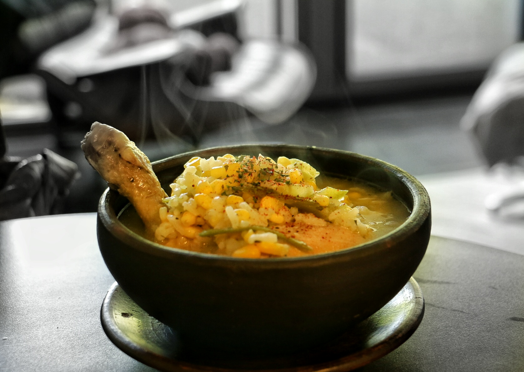 La cazuela puede ser hecha de ave o de vacuno, es un plato muy típico de Chile. Ideal para los días de invierno o para aquellas personas que gustan de los caldos. En las zonas más tradicionales de Chile preparan la cazuela con la gallina fresca de campo. Hay algunas variedades en como prepararla, la que aquí comparto es mucho más sana ya que no utilizo aceite ya que el mismo pollo suelta su grasa, quedando bastante sabrosa.